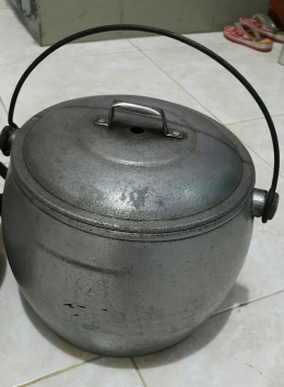 Basa Sunda: Paranti ngaliwet atuh ieu mah